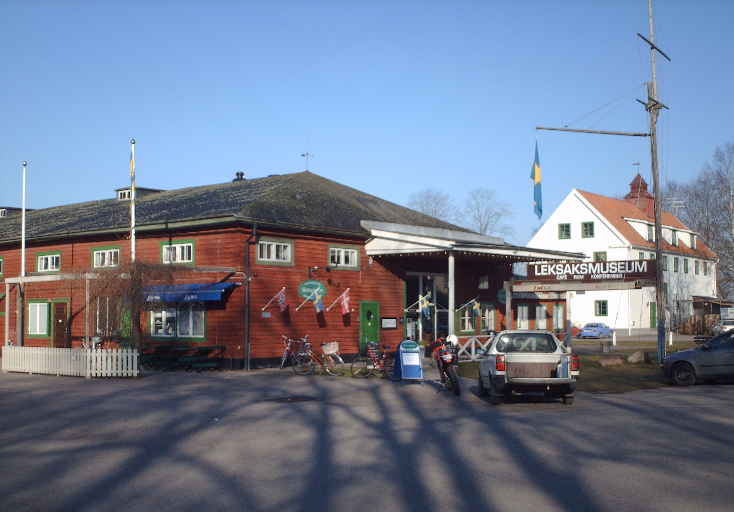 Leksaksmuseet, Vadstena, Sweden